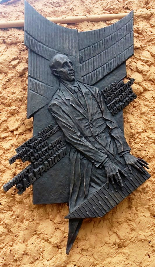 Мемориальная доска по адресу ул. Димитрова, 12, Курск, Россия. Установлена в октябре 2015 года.